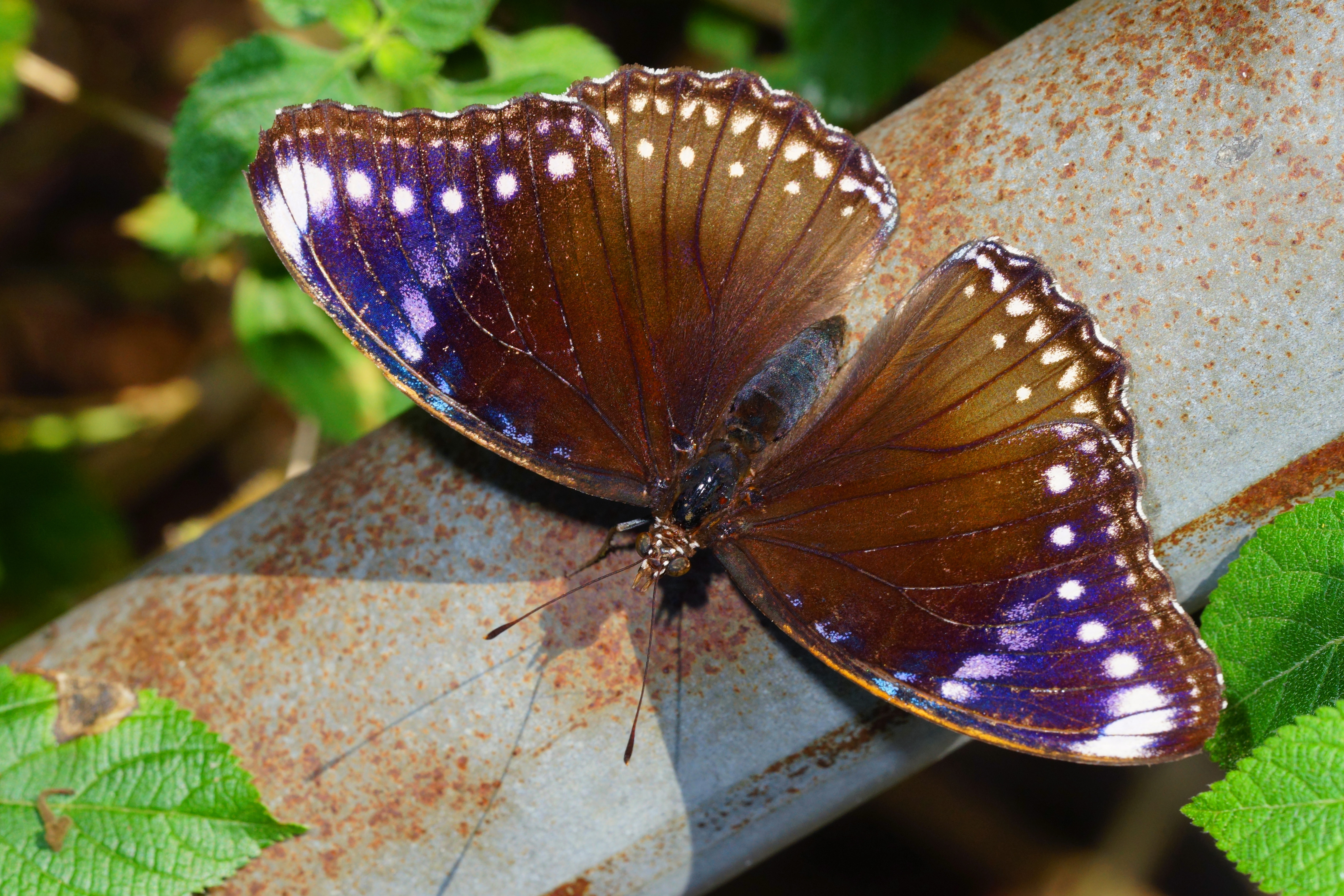 幻蛺蝶 Hypolimnas bolina kezia